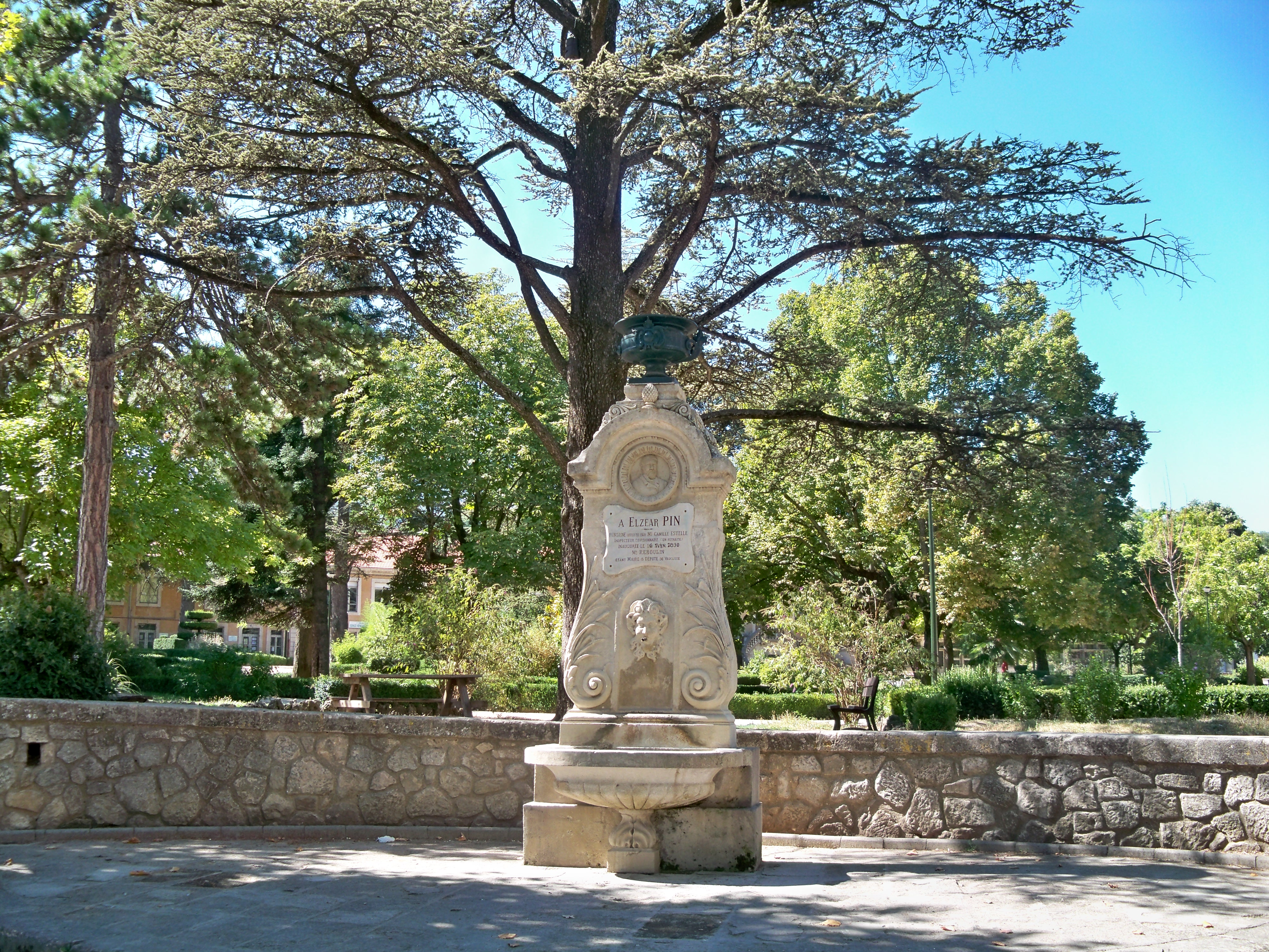 Fontaine dédiée à Elzéar Pin à Apt, Vaucluse, France